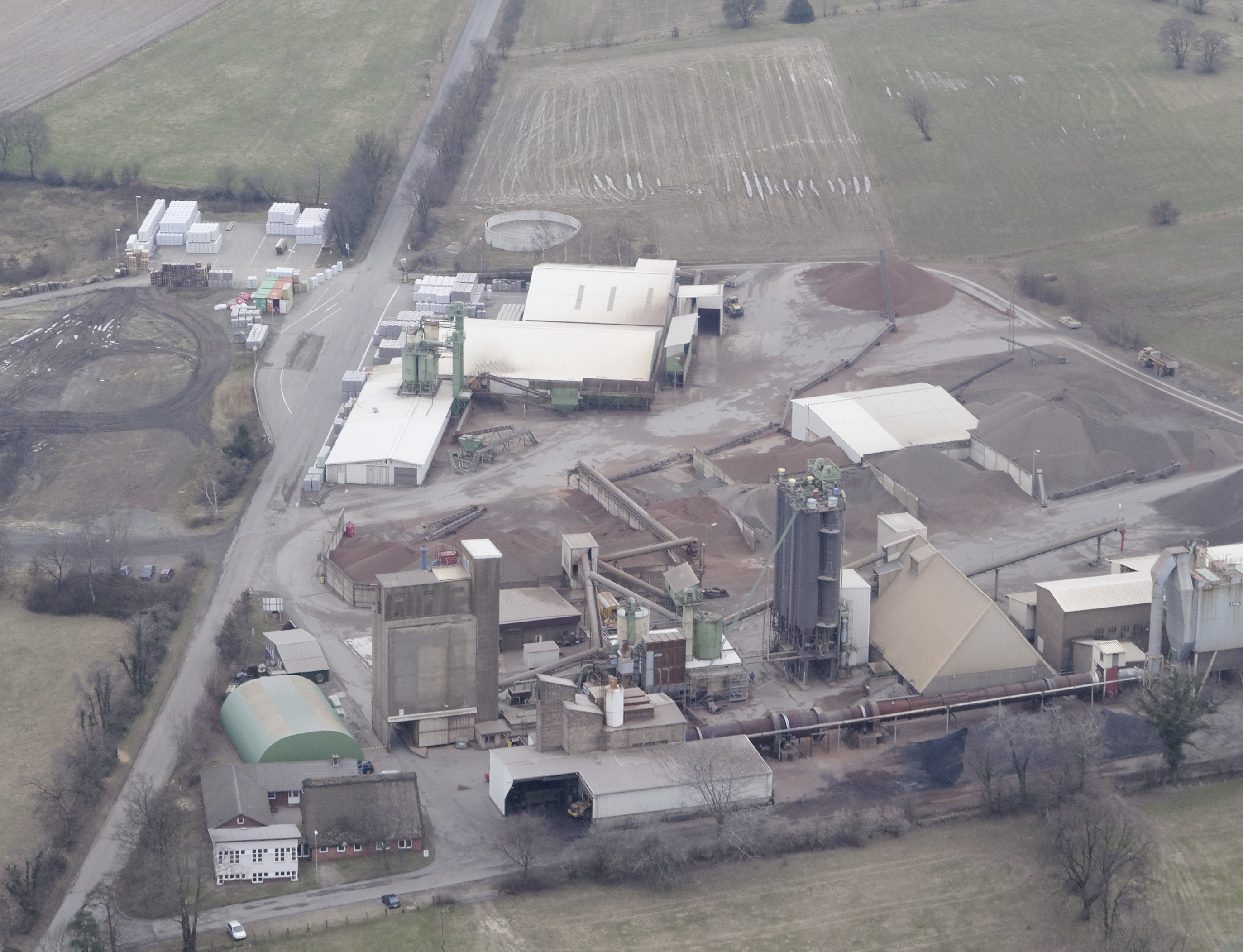 Luftaufnahme: Unternehmen Fibo ExClay Deutschland